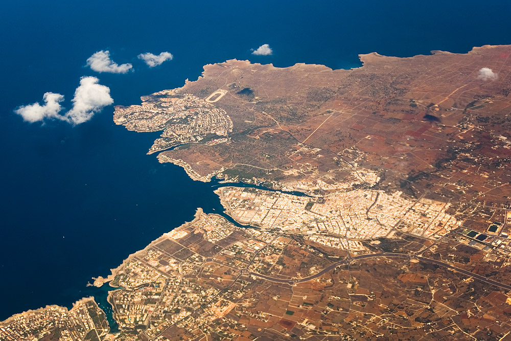 Ciutadella from air